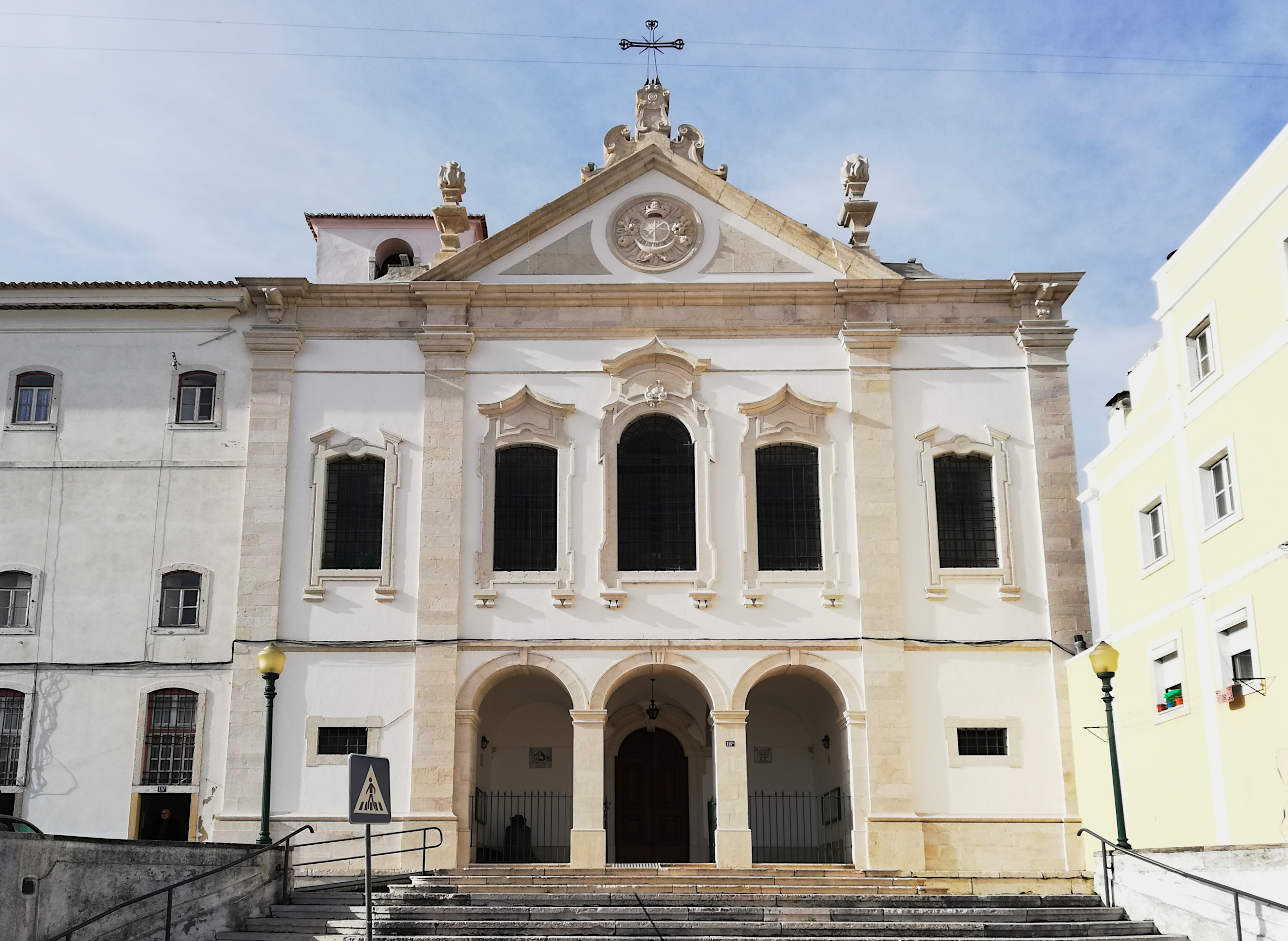 Igreja Paroquial de São Bartolomeu do Beato ou Convento do Grilo